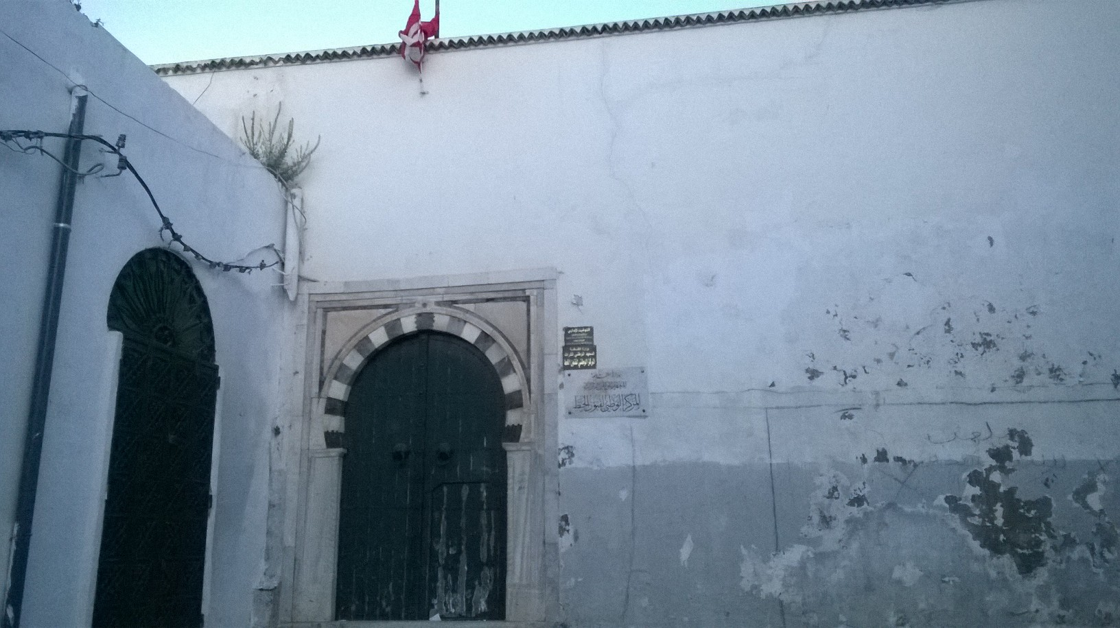 El Halfaouine, Bab Souika , Tunis الحلفاوين, باب سويقة ، تونس